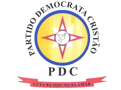 Flag of East Timorese party Partido Democrata Cristão PDC